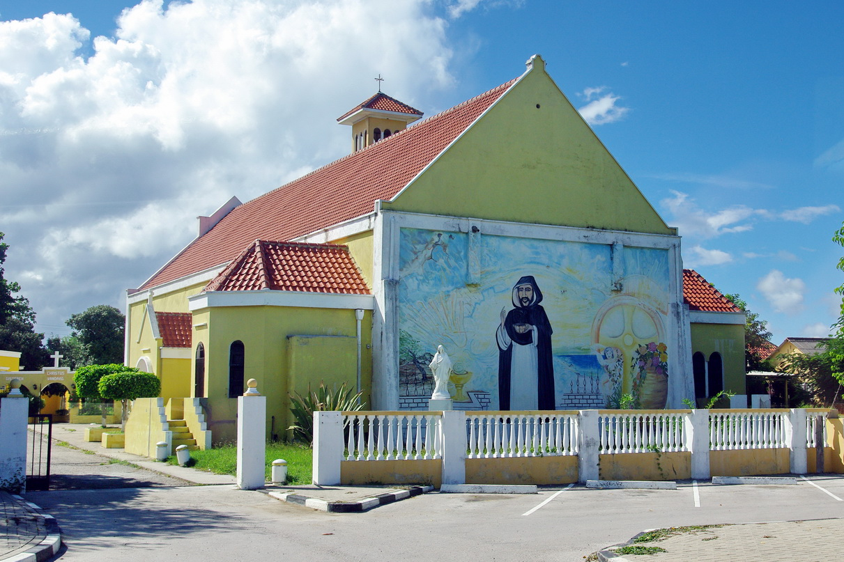 Kirche von Rincon